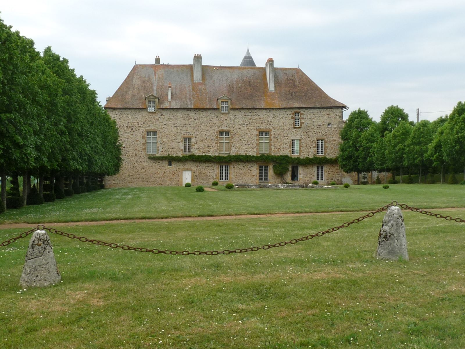 château de Serre, Abzac (16), France